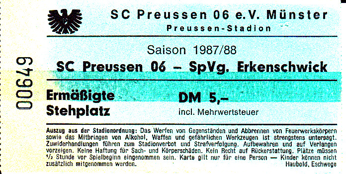 Eintrittskarte